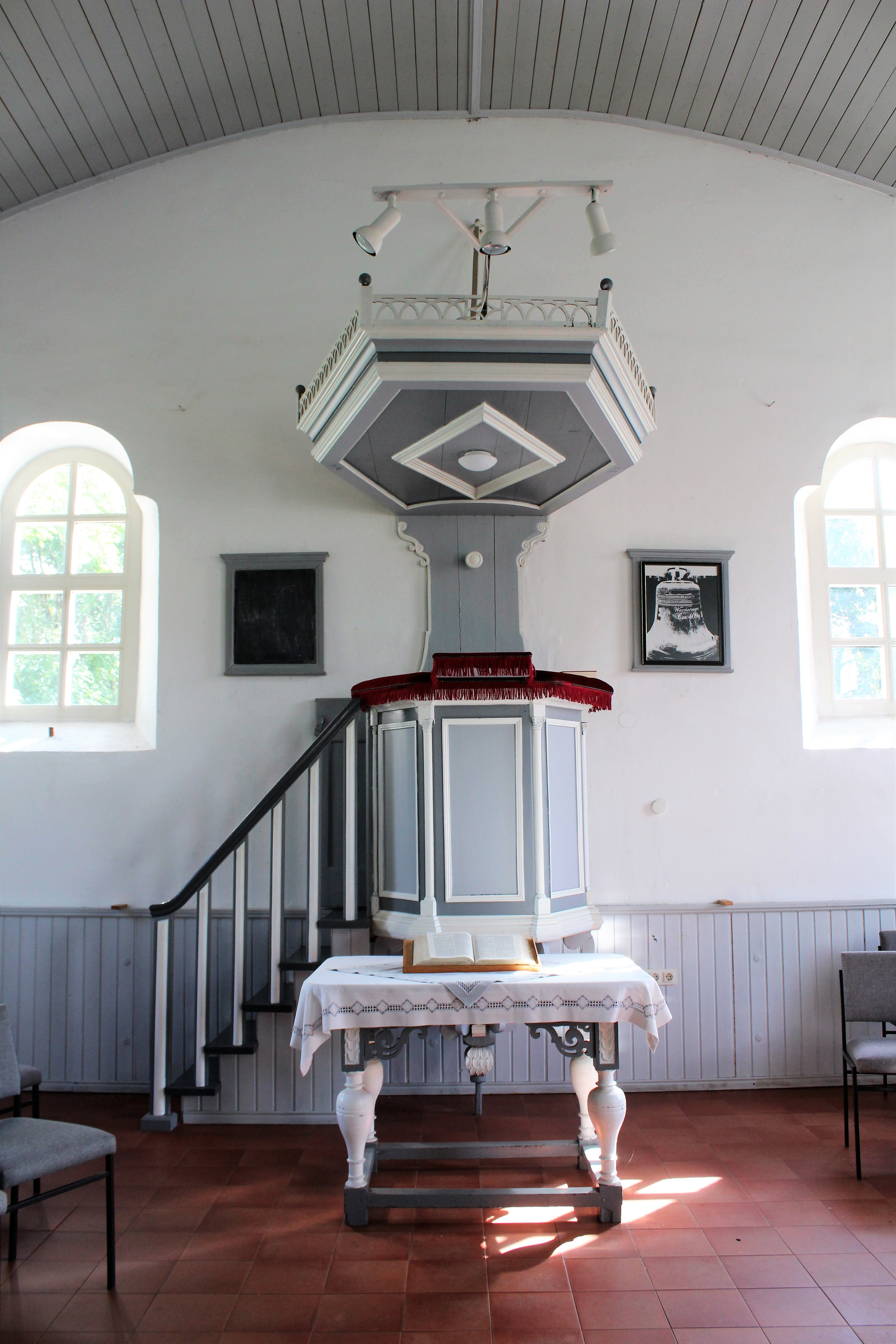 Ev.-reformierte Kirche Weenermoor, Landkreis Leer, Ostfriesland, Deutschland